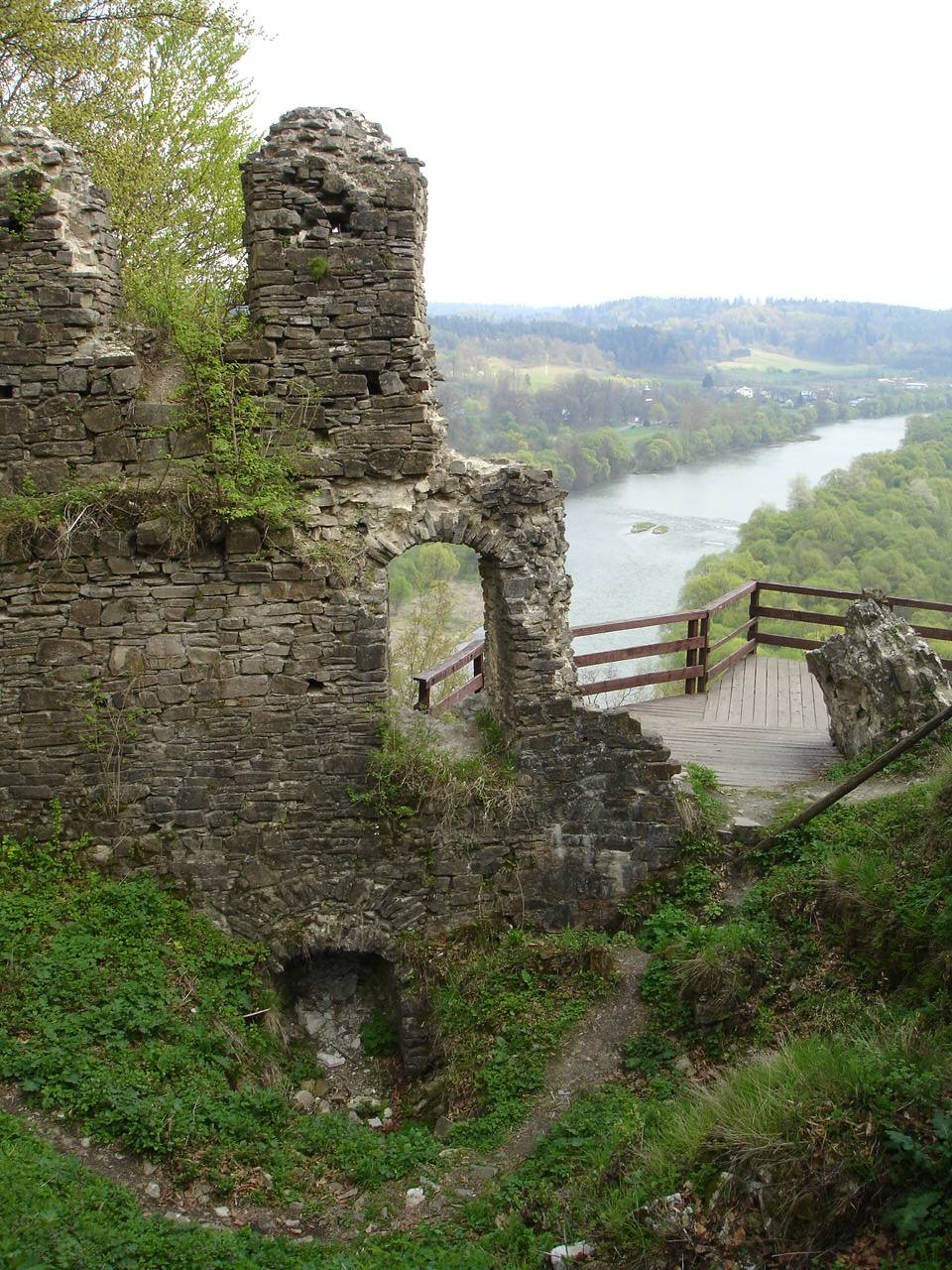 ruiny zamku Sobien